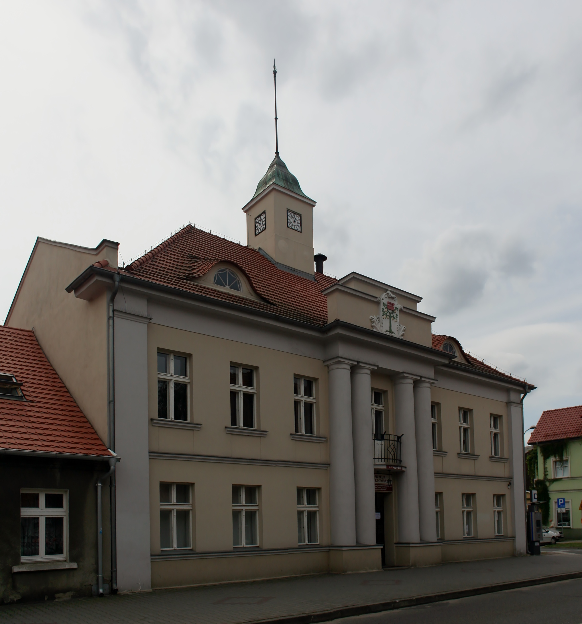 Międzychód, ul. 17 Stycznia 100. Budynek Miejskiej Kasy Oszczędności, ob. Muzeum Regionalne, 1904.